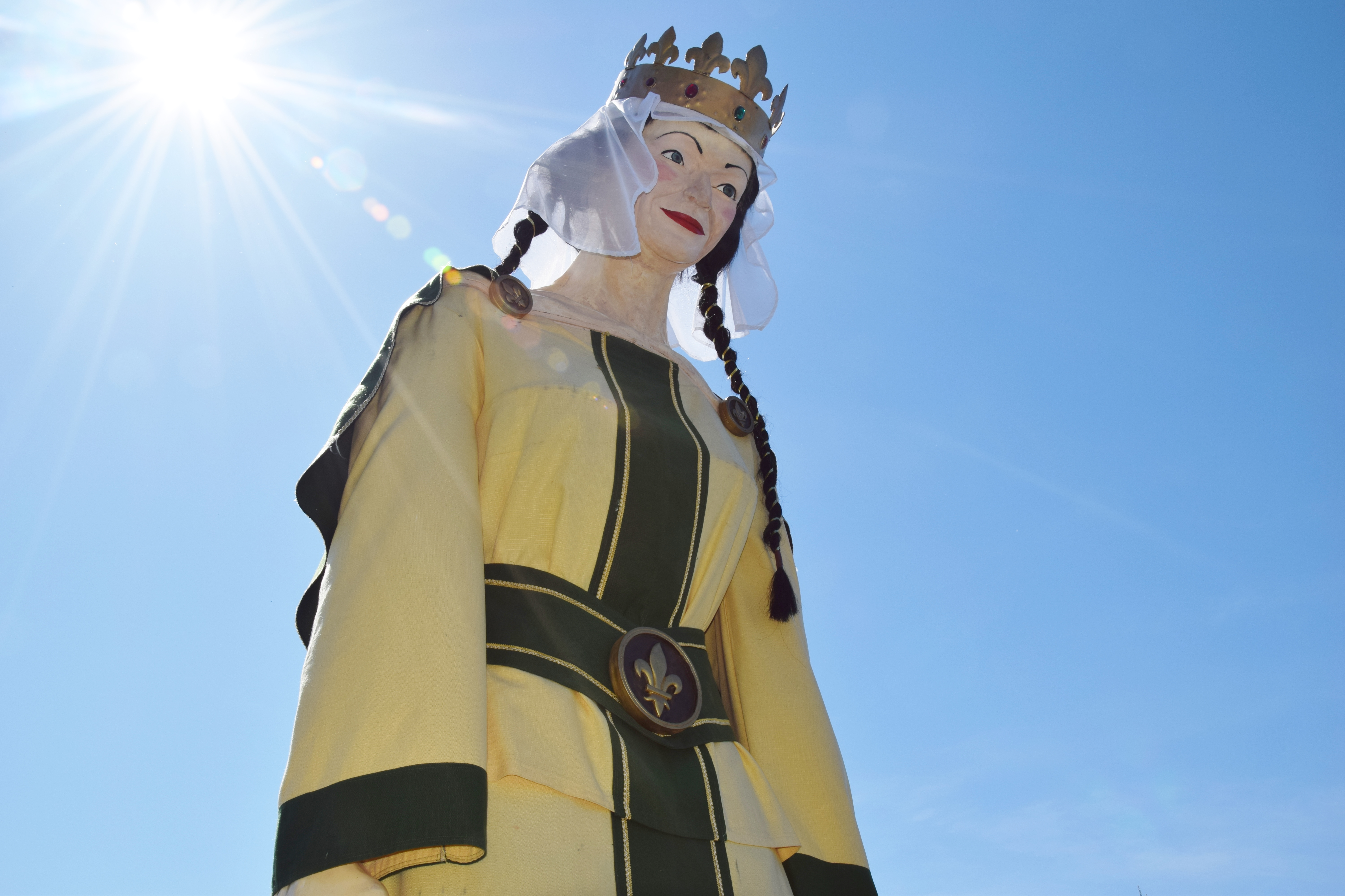 Somain était au IXe siècle un fisc impérial c'est-à-dire un domaine direct du Prince, donné à la princesse Gisèle, fille de Louis le Pieux lors de son mariage avec le comte Evrard de Frioul. La princesse Gisèle est le géant de Somain.